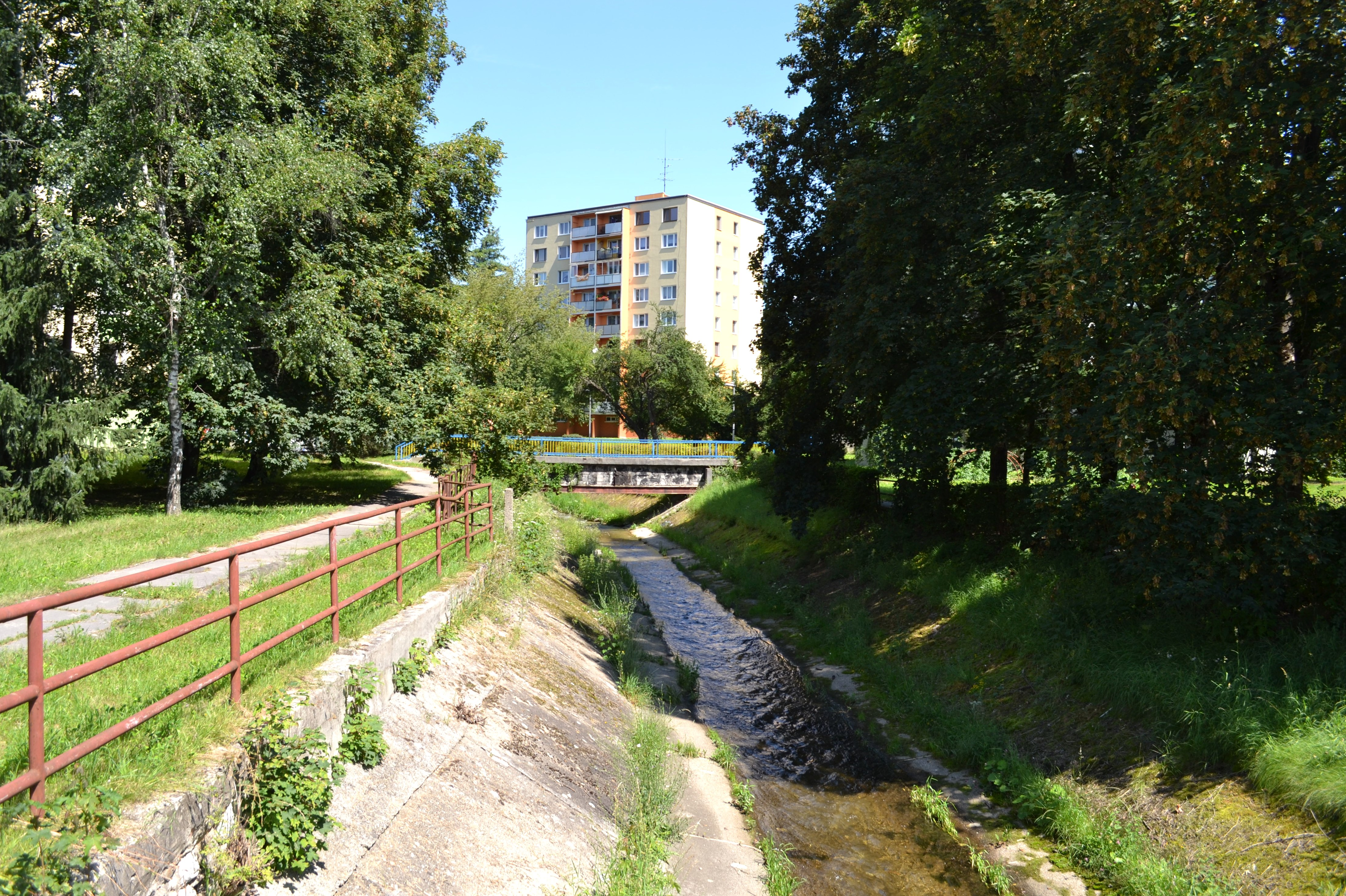 Rožňavský potok pretekajúci mestom Rožňava